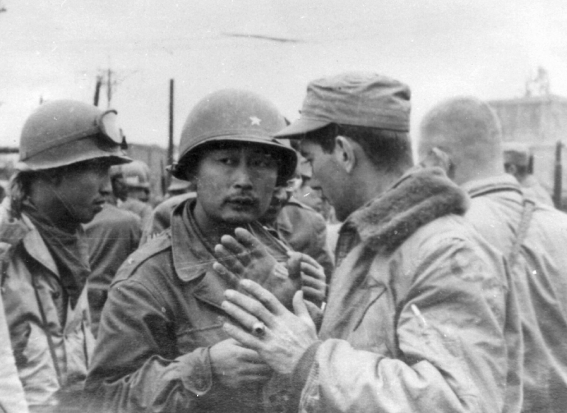 Paik Sun-yup in Korean War, 1950-October